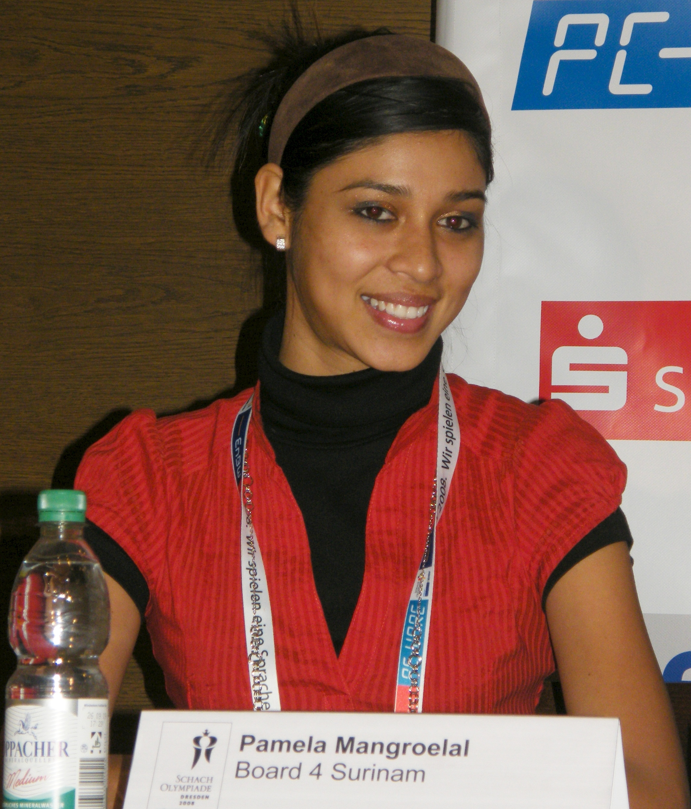 Pamela Mangroelal bei einer Pressekonferenz der 38. Schacholympiade in Dresden 2008